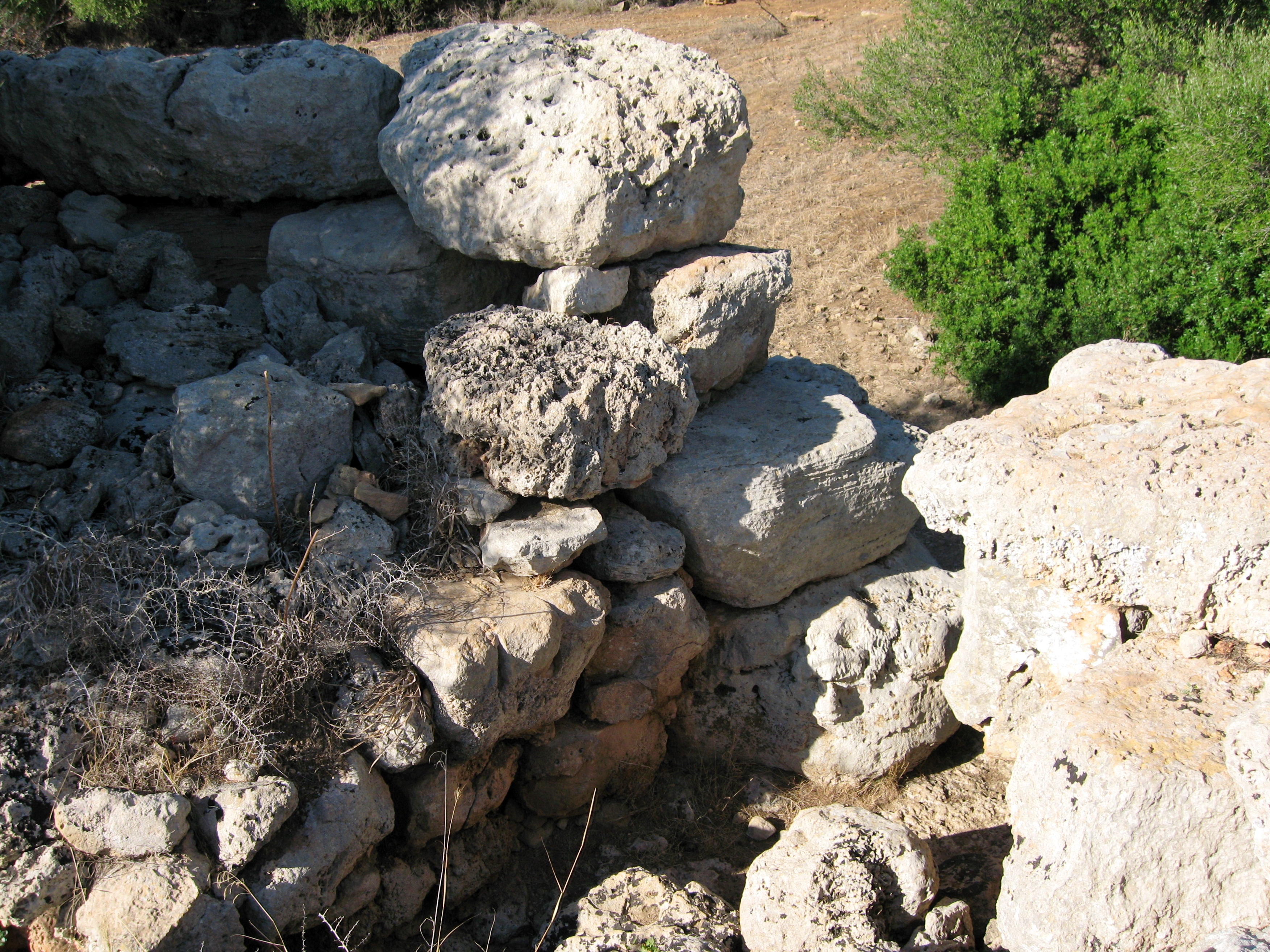 Runder Talayot sa Clova des Xot (Talaiot de sa Canova) auf dem Landgut sa Canova de Morell in der Gemeinde Artà, Mallorca, Spanien